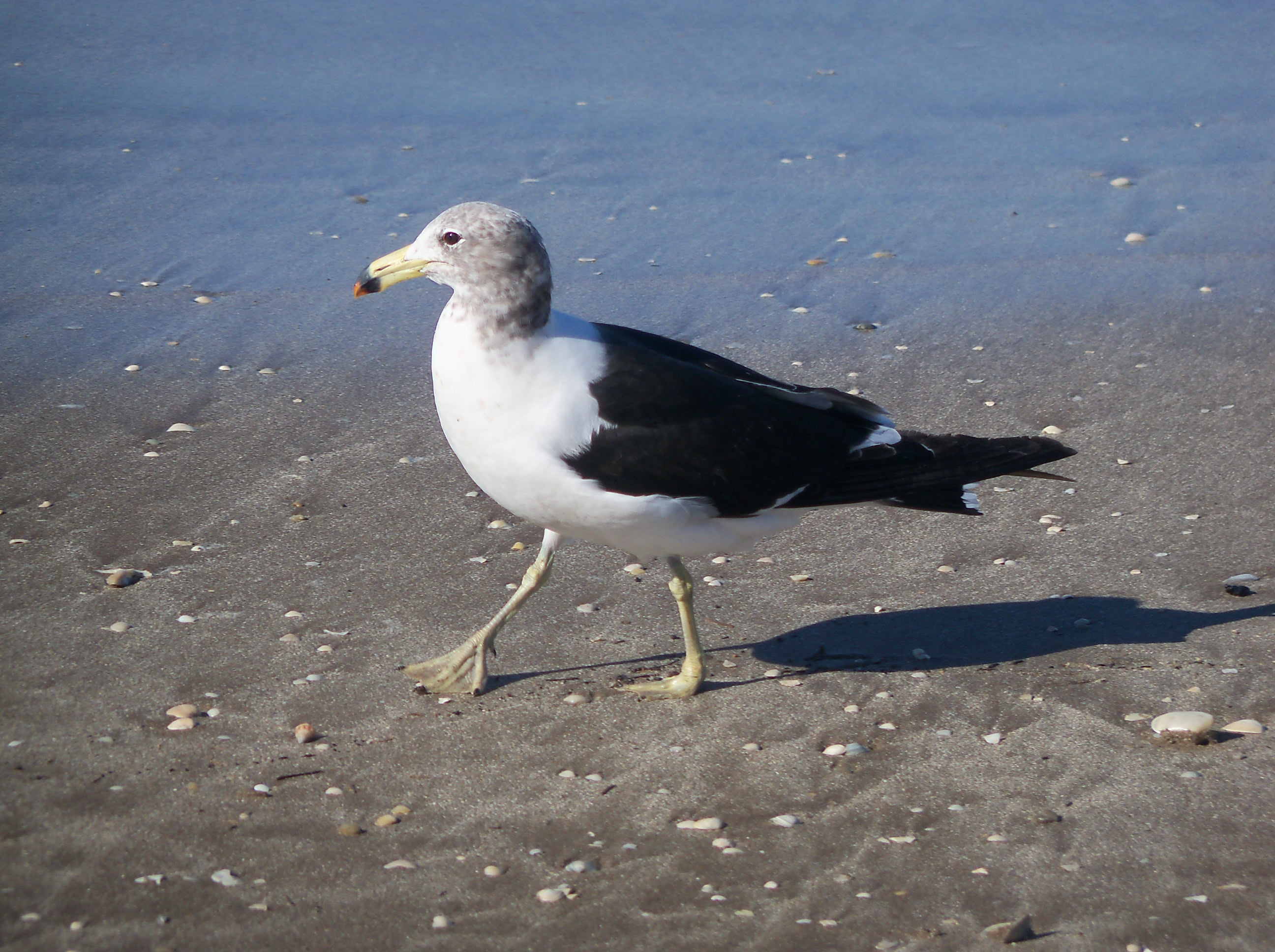 Juvenil de gaviota cangrejera (Larus atlanticus) en la playa de Santa Teresita